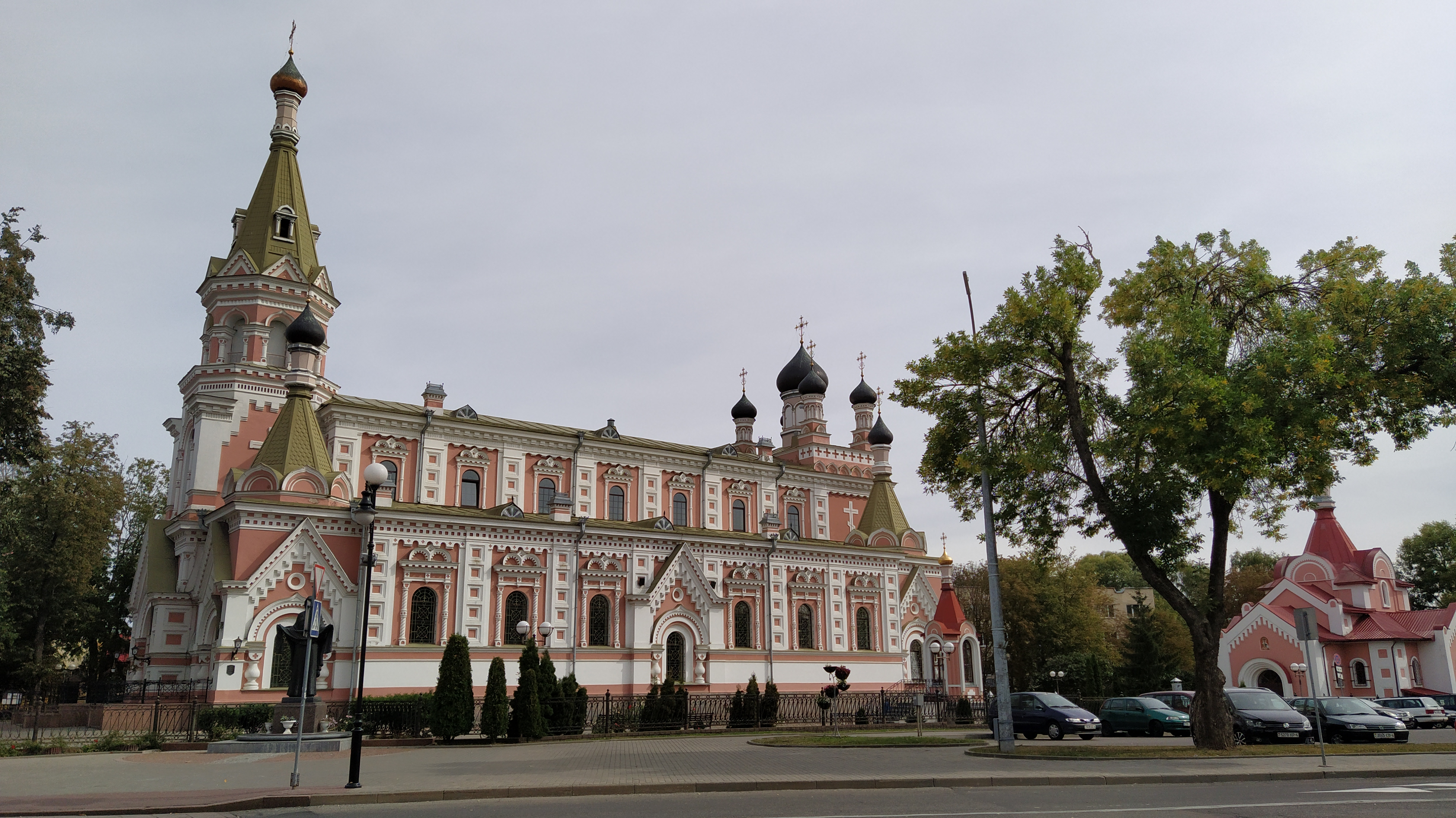 Sobór Opieki Matki Bożej w Grodnie.